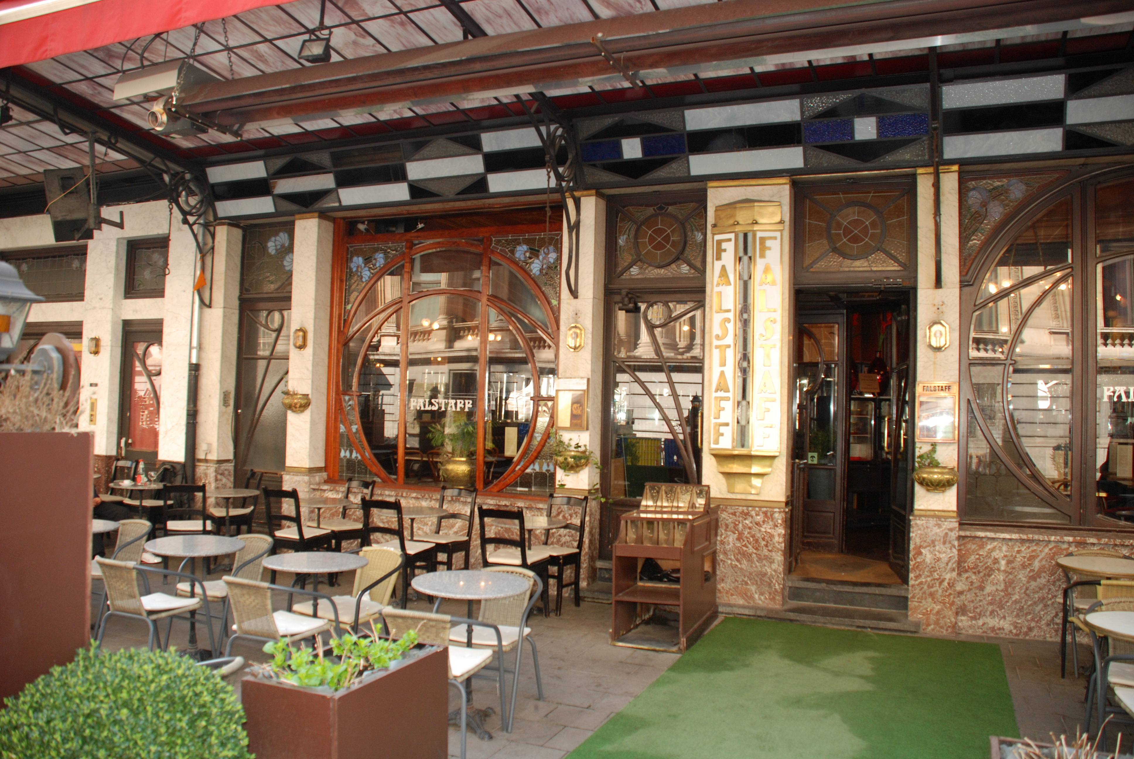 Belgique - Bruxelles - Taverne-restaurant le Falstaff